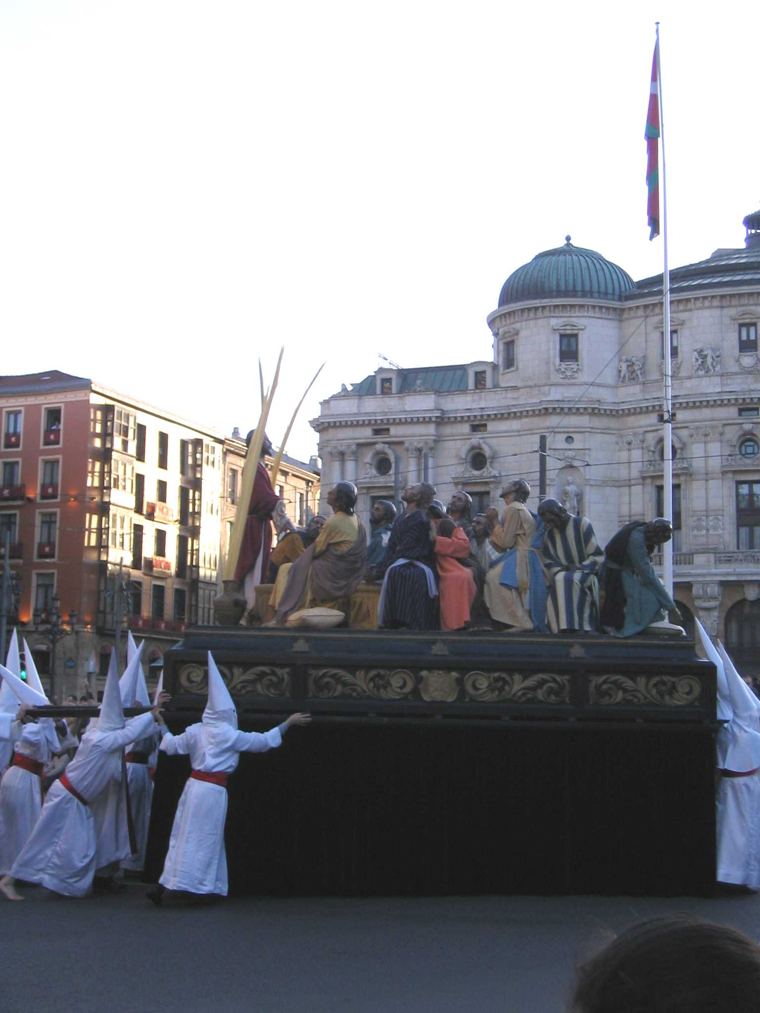 Procesión de Jueves Sando en Bilbao, Vizcaya, País Vaco, España.